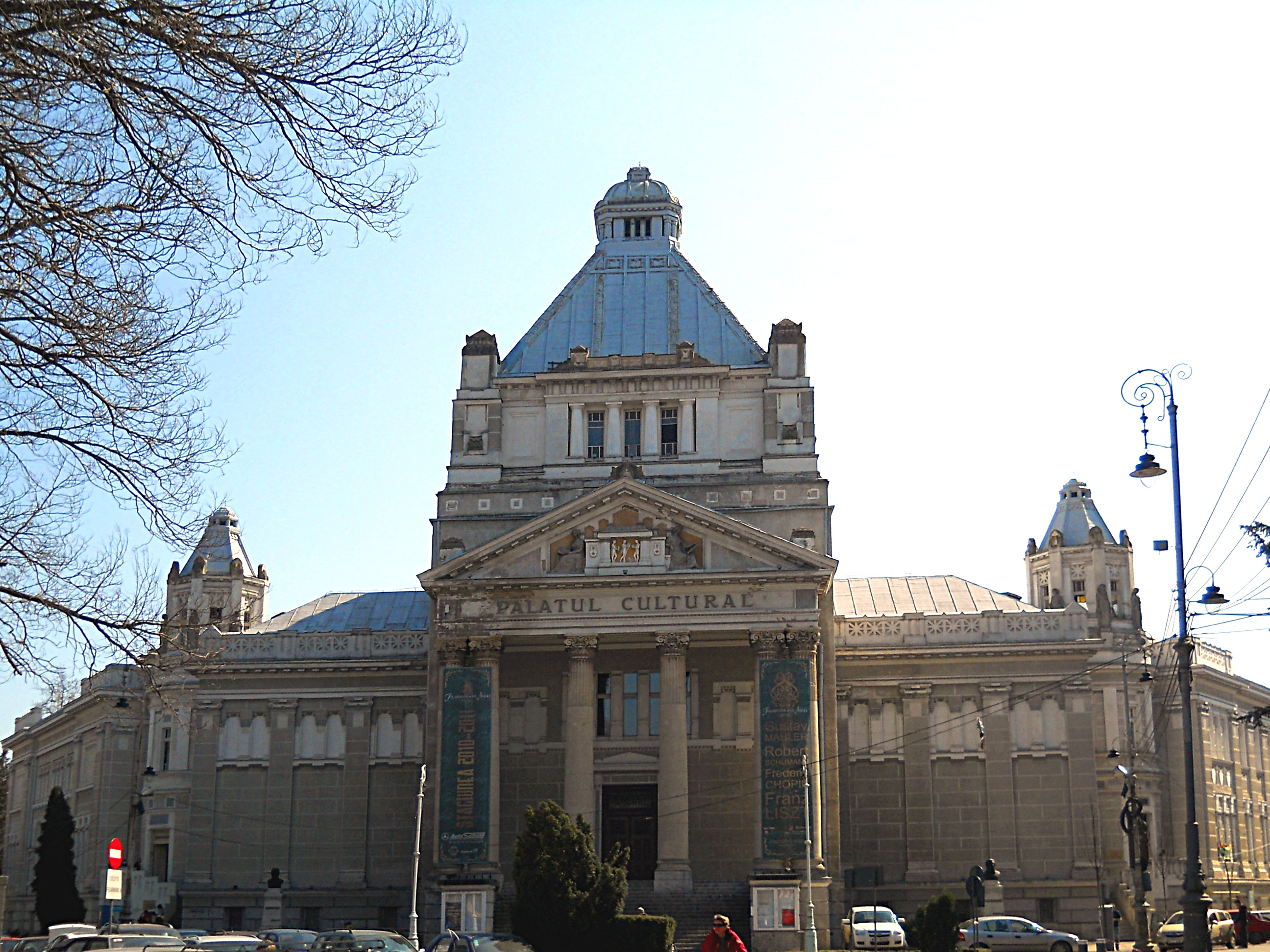 Palatul de cultural ridicat de Lajos Szantay